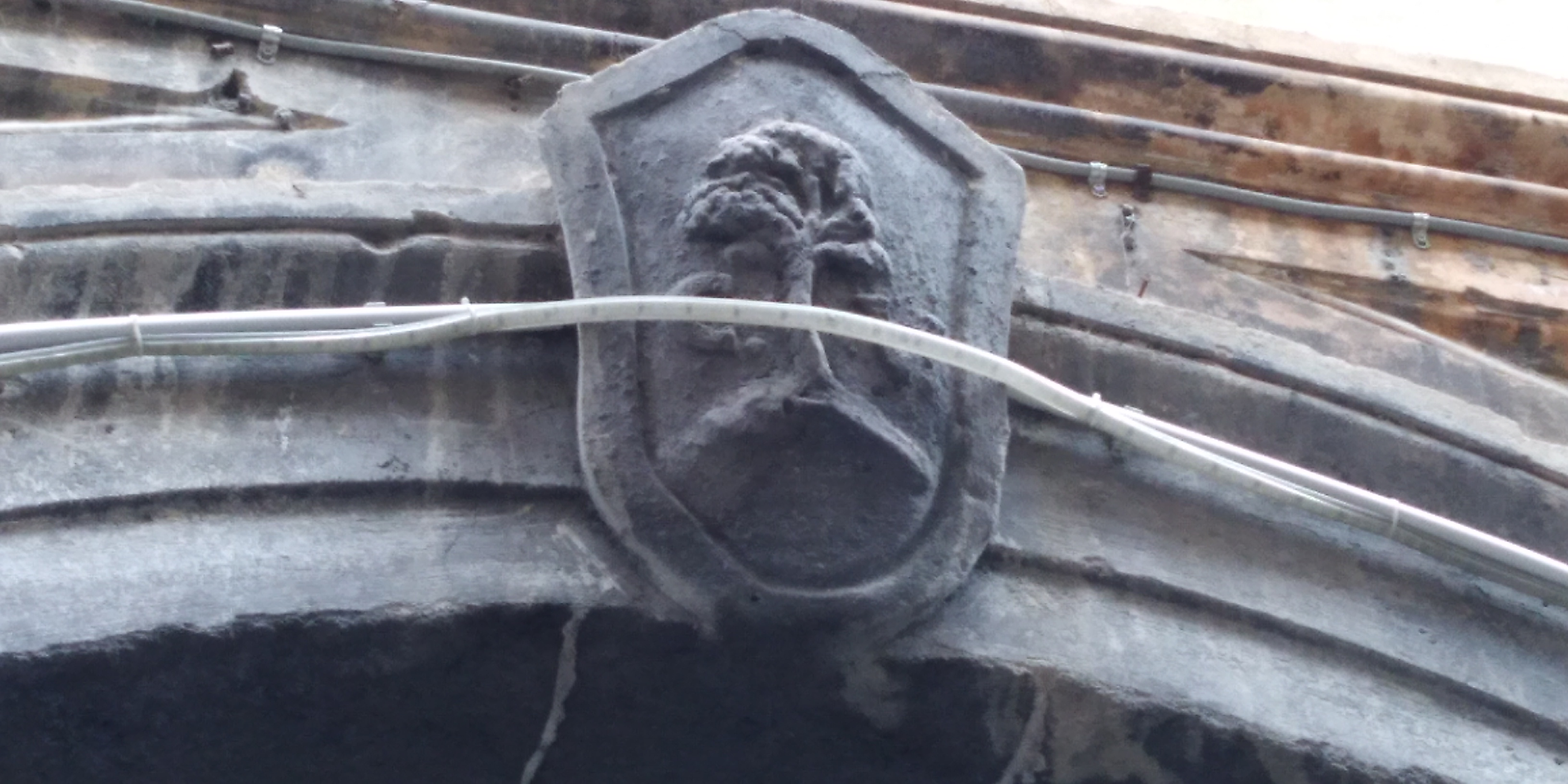 Fregio di Nocera dei Pagani presso il Portone de' Seminelle al Casale del Pozzo, Nocera Inferiore